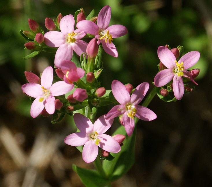 Description: Centaurium erythraea Date: 22. june 2004